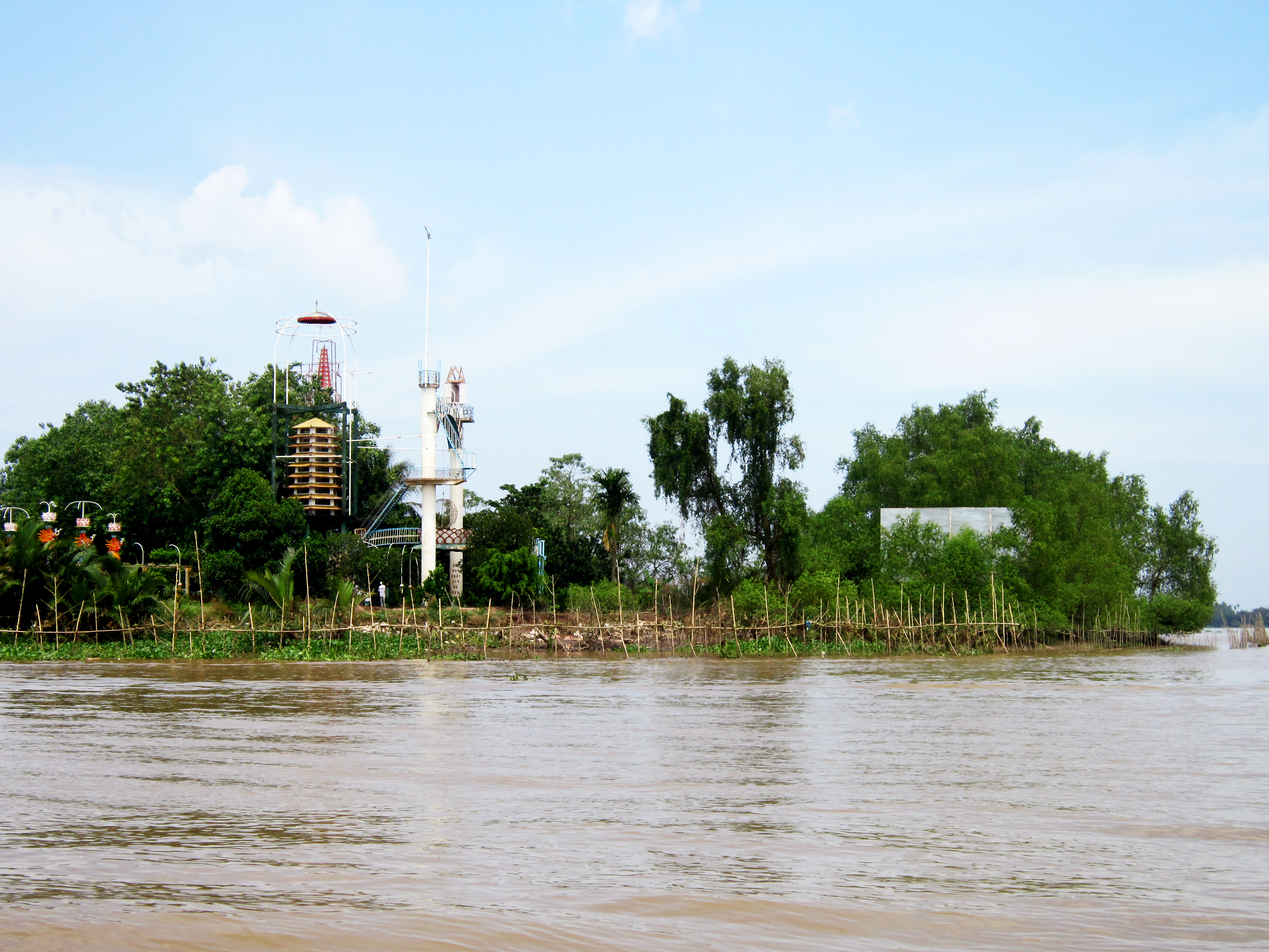 Một đầu cồn Phụng trên sông Tiền, nay thuộc tỉnh Bến Tre, Việt Nam. Đây là nơi hành đạo của ông Đạo Dừa (Nguyễn Thành Nam, 1909-1990) trước 1975.